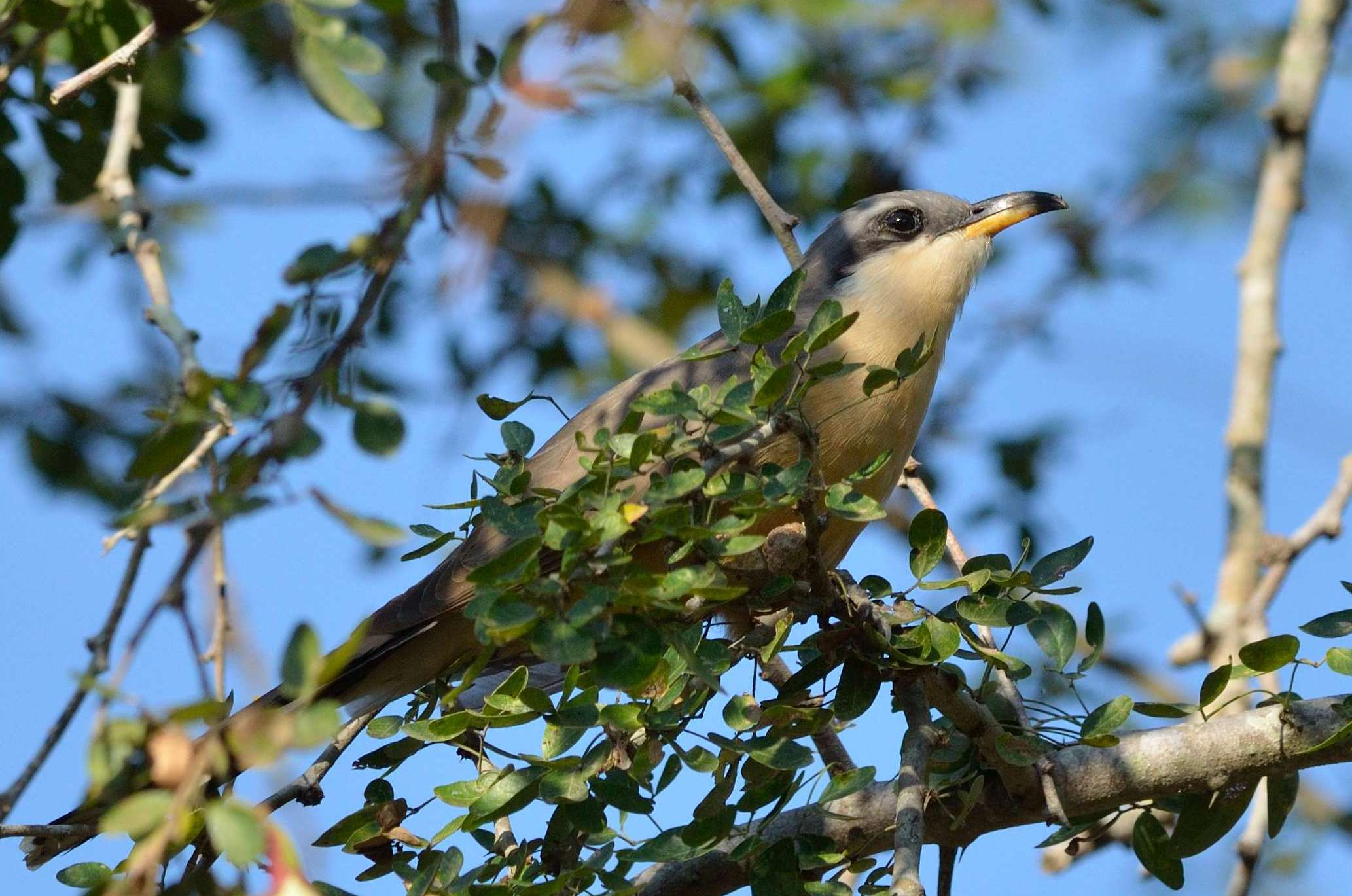 Coccyzus minor